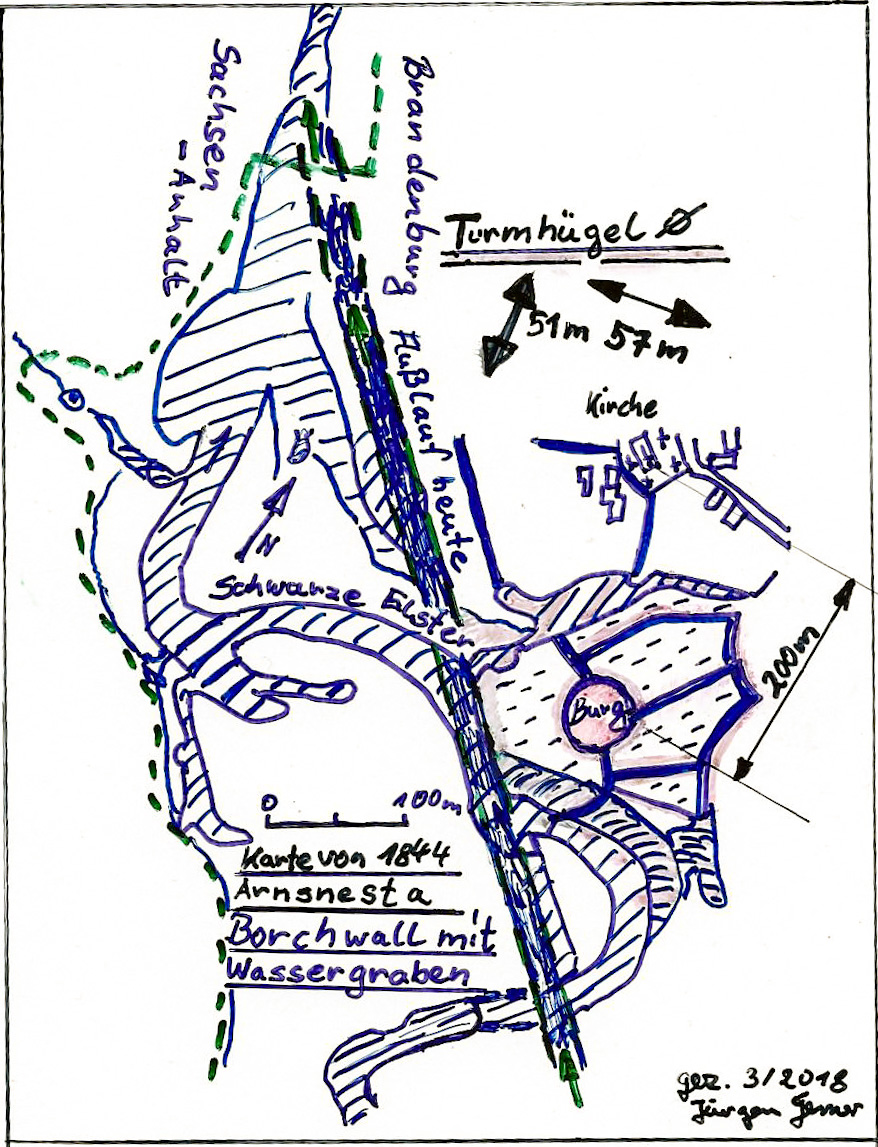 Die Skizze zeigt den ehemaligen Flusslauf der Schwarzen Elster mit dem Burghügel der einstigen Wasserburg Arnsnesta. Nach einer Zeichnung von 1844 und einer Lageskizze der Bodendenkmalpfleger.